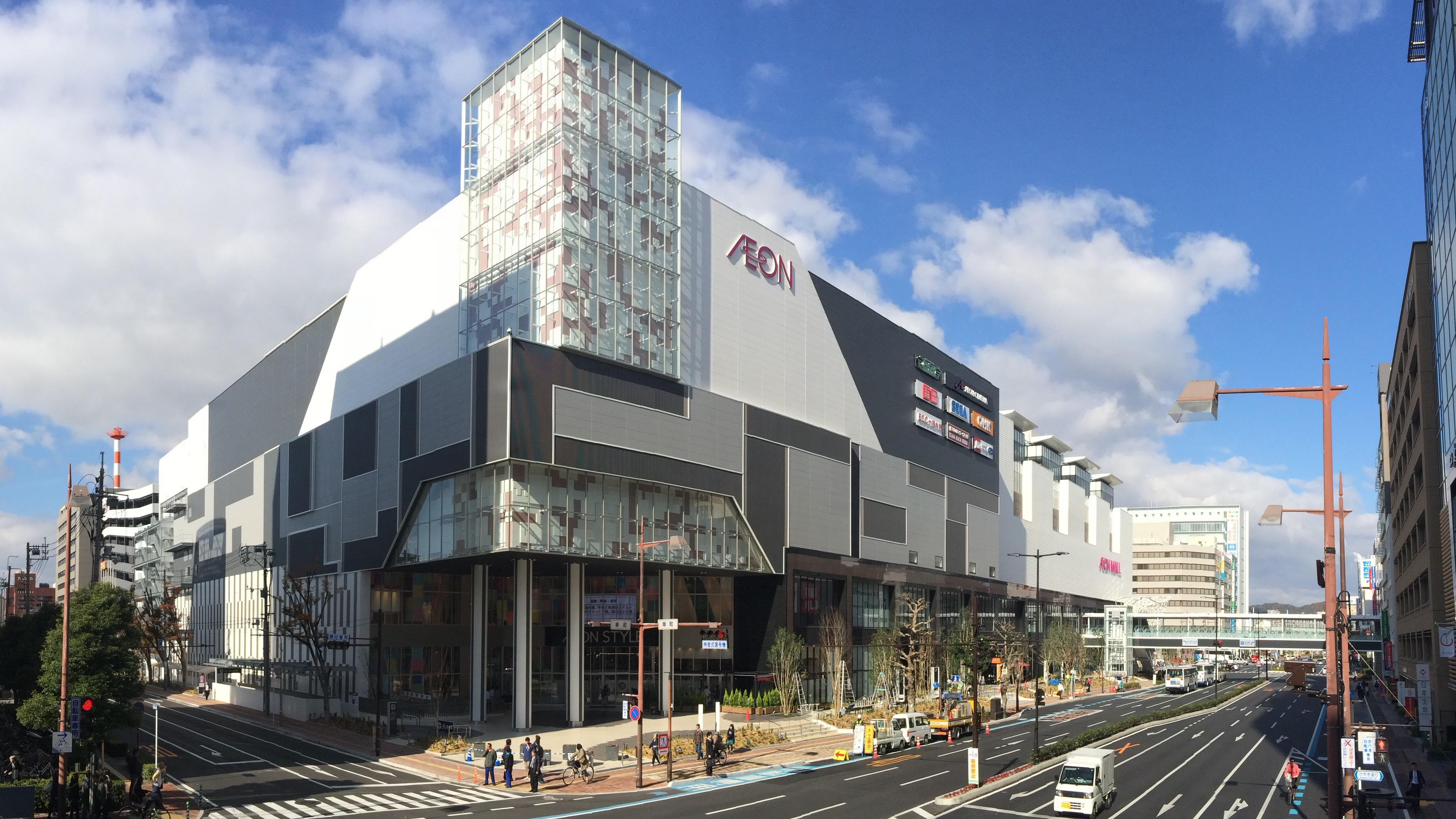 岡山県岡山市北区にあるイオンモール岡山の外観。